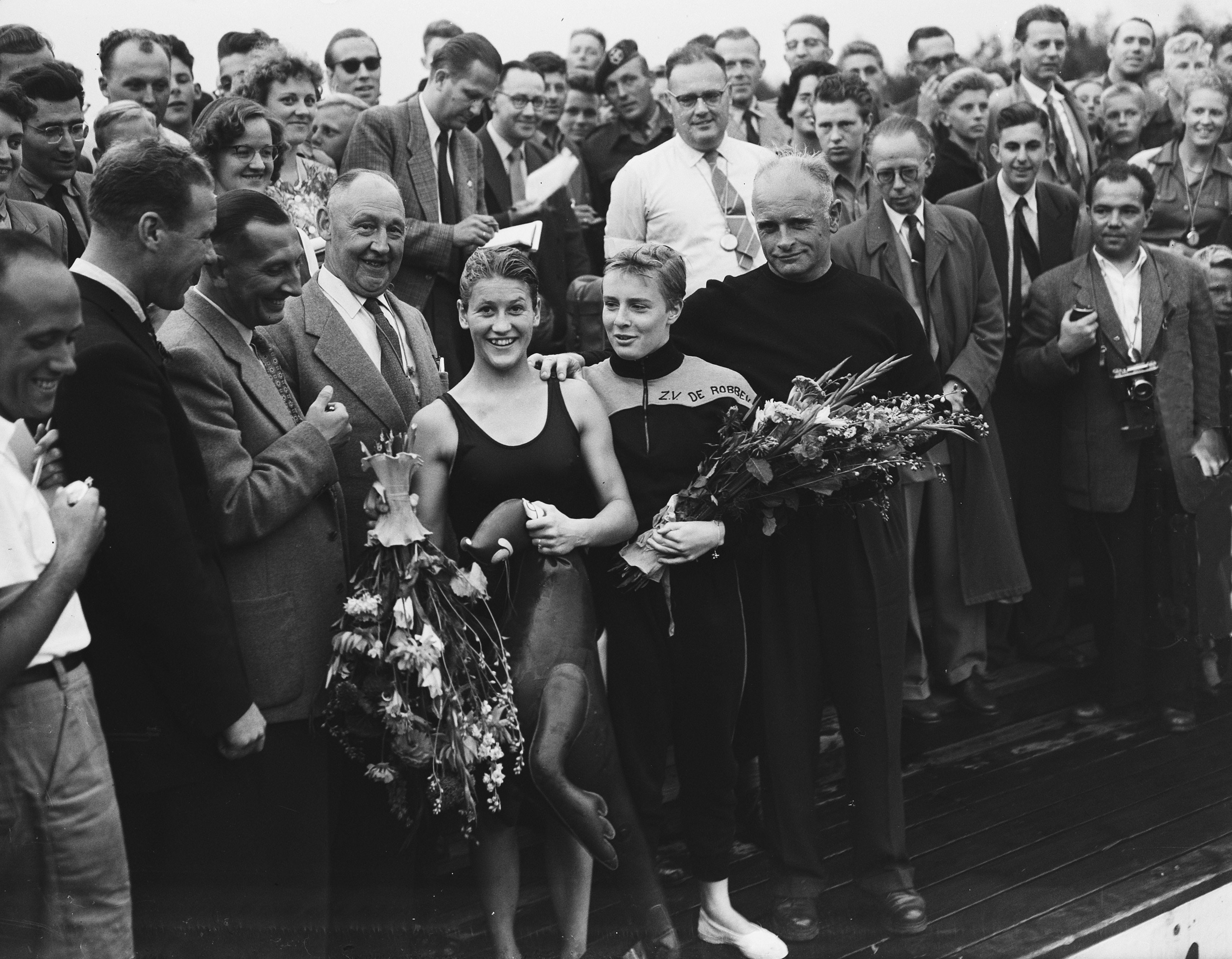 Utrecht. Nieuw wereldrecord Engelse mijl Lenie de Nijs, rechts naast haar Mary Kok, daarnaast Jan Stender